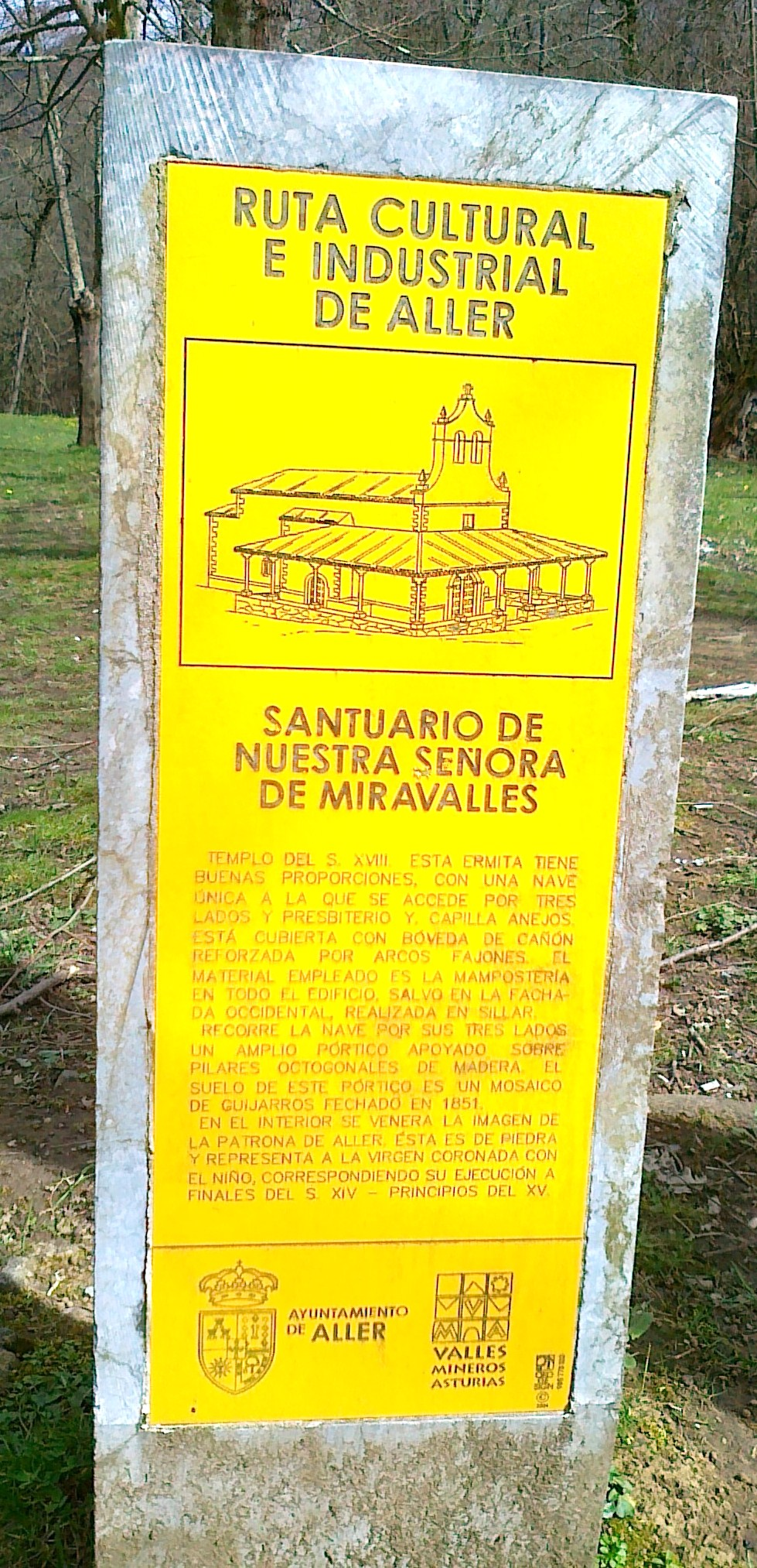 Santuario Miravalles-Placa explicativa-2B